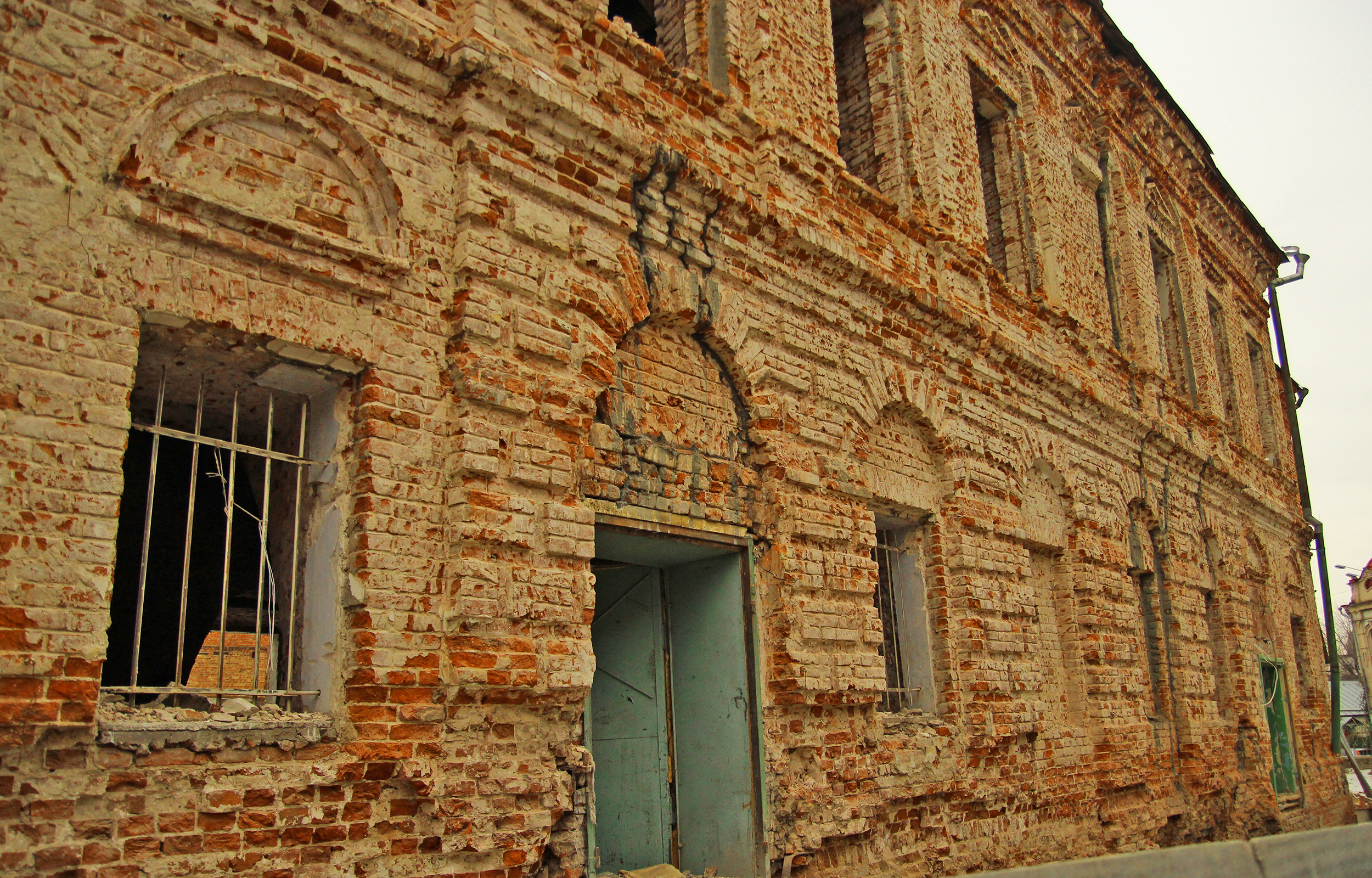 Галеевская мечеть (Республика Татарстан, Казань, тукаевская улица, 40)